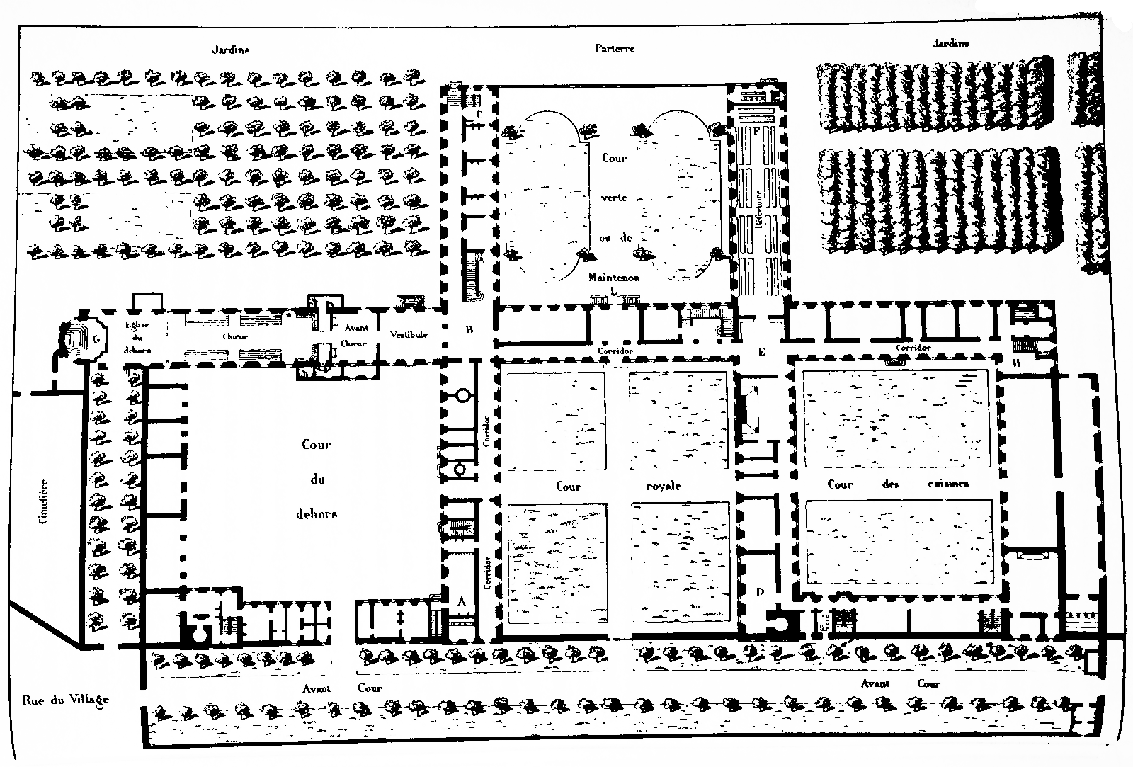 Plan des bâtiments de la Maison Royale de Saint-Louis (rez-de-chaussée) par Jules Hardouin-Mansart vers 1684-1685. Les lettres indiquées sur le plan permettent de situer les différentes pièces : Rez-de-chaussée : BC : appartements de Madame de Maintenon AB : dortoir des soeurs converses BE : salle de communauté et réfectoire des Dames EF : réfectoire des Demoiselles ED : cuisines EH : salles de musique et de danse BG : chapelle 1er étage : BC : infirmerie des Demoiselles AB : appartements de la Supérieure BE : salle de classe verte EF : salle de classe bleue ED : salle de classe jaune EH : salle de classe rouge 2e étage : BC : infirmerie des Dames et des soeurs converses AB : dortoir des Dames BE : dortoir des Demoiselles de la classe verte EF : dortoir des Demoiselles de la classe bleue ED : dortoir des Demoiselles de la classe jaune EH : dortoir des Demoiselles de la classe rouge